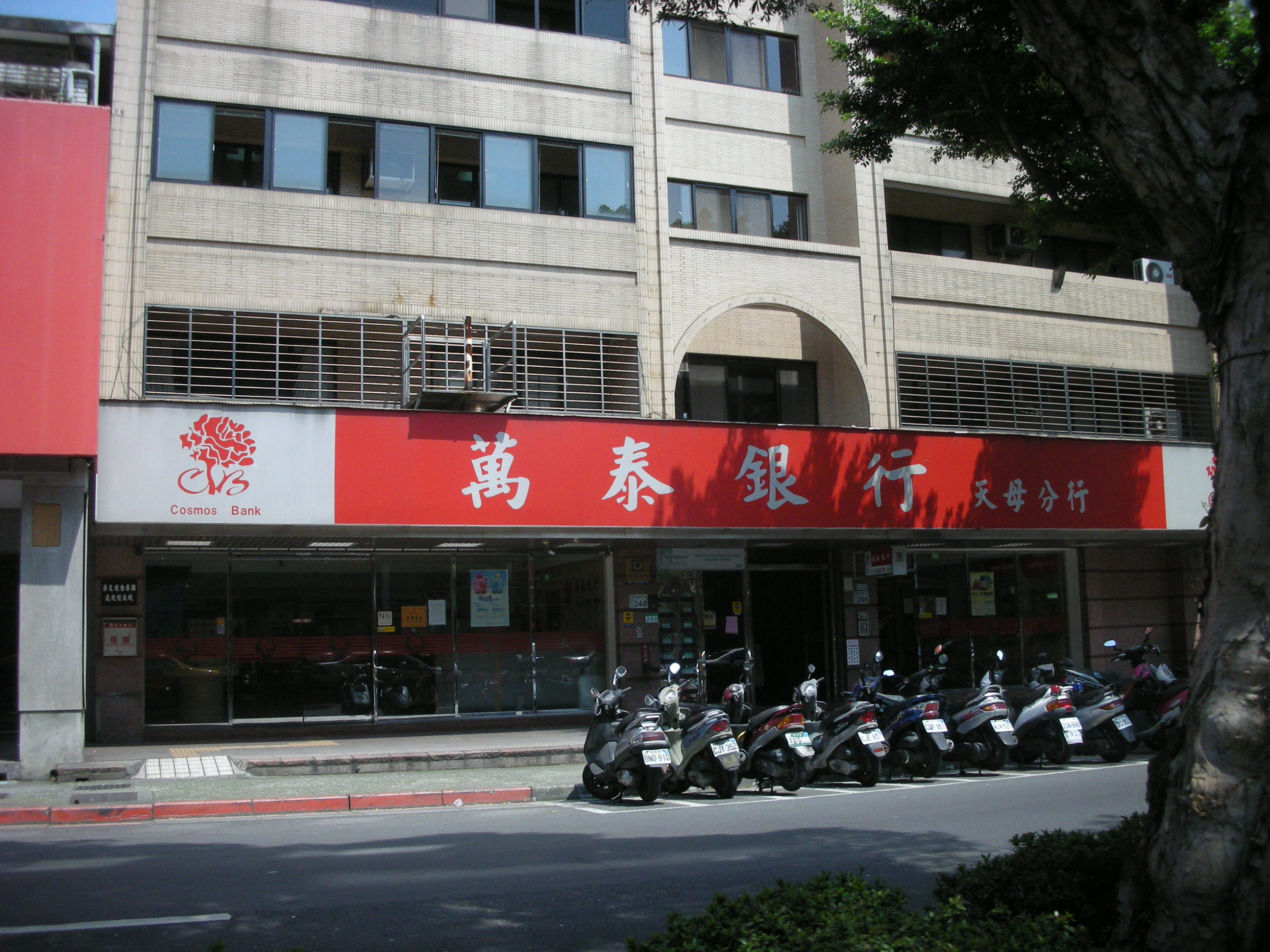 中文（台灣）: 萬泰商業銀行天母分行，位於臺北市士林區中山北路六段246號1樓。